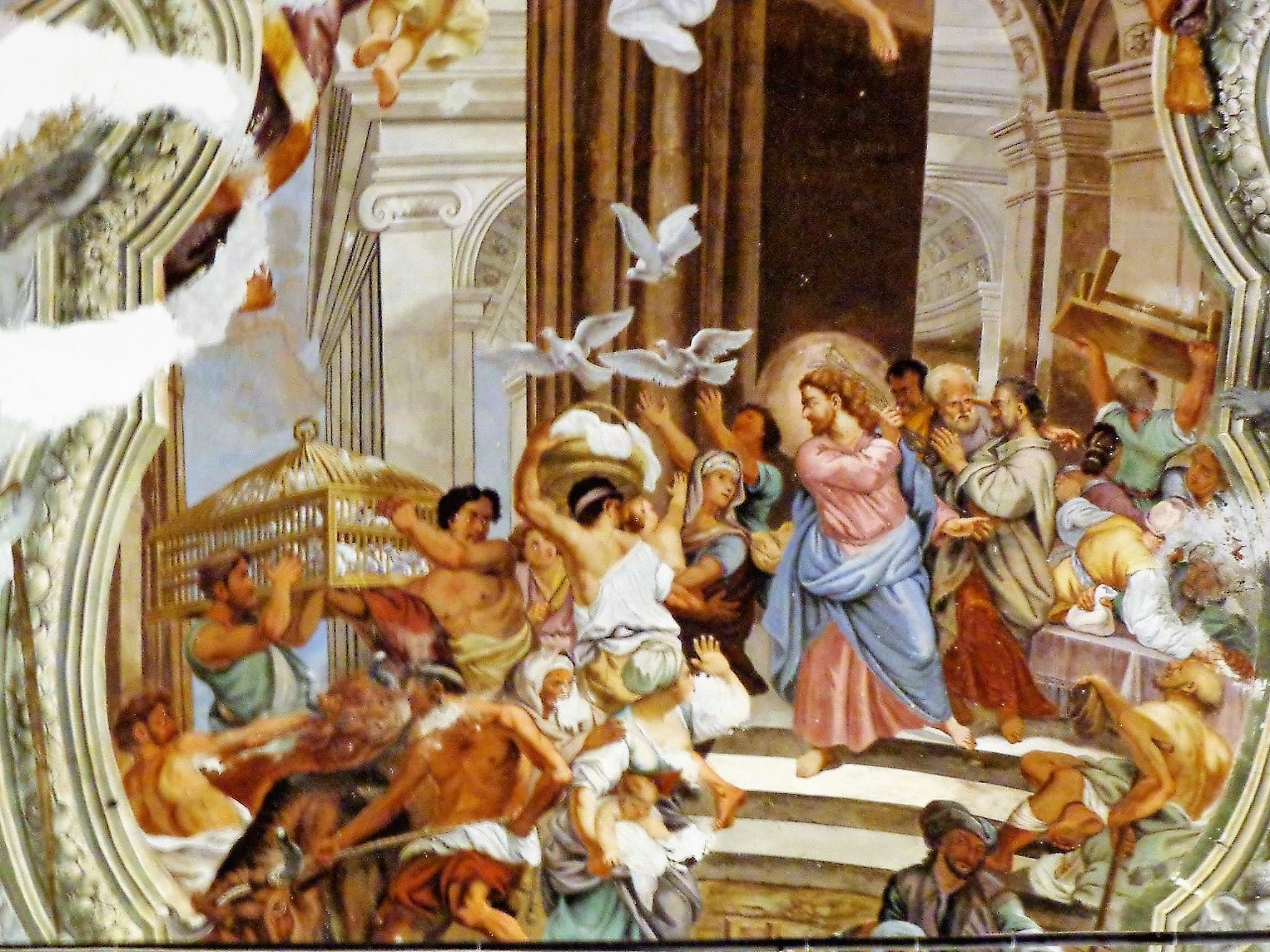 Affresco volta dettaglio, foto già presente su account personale FB